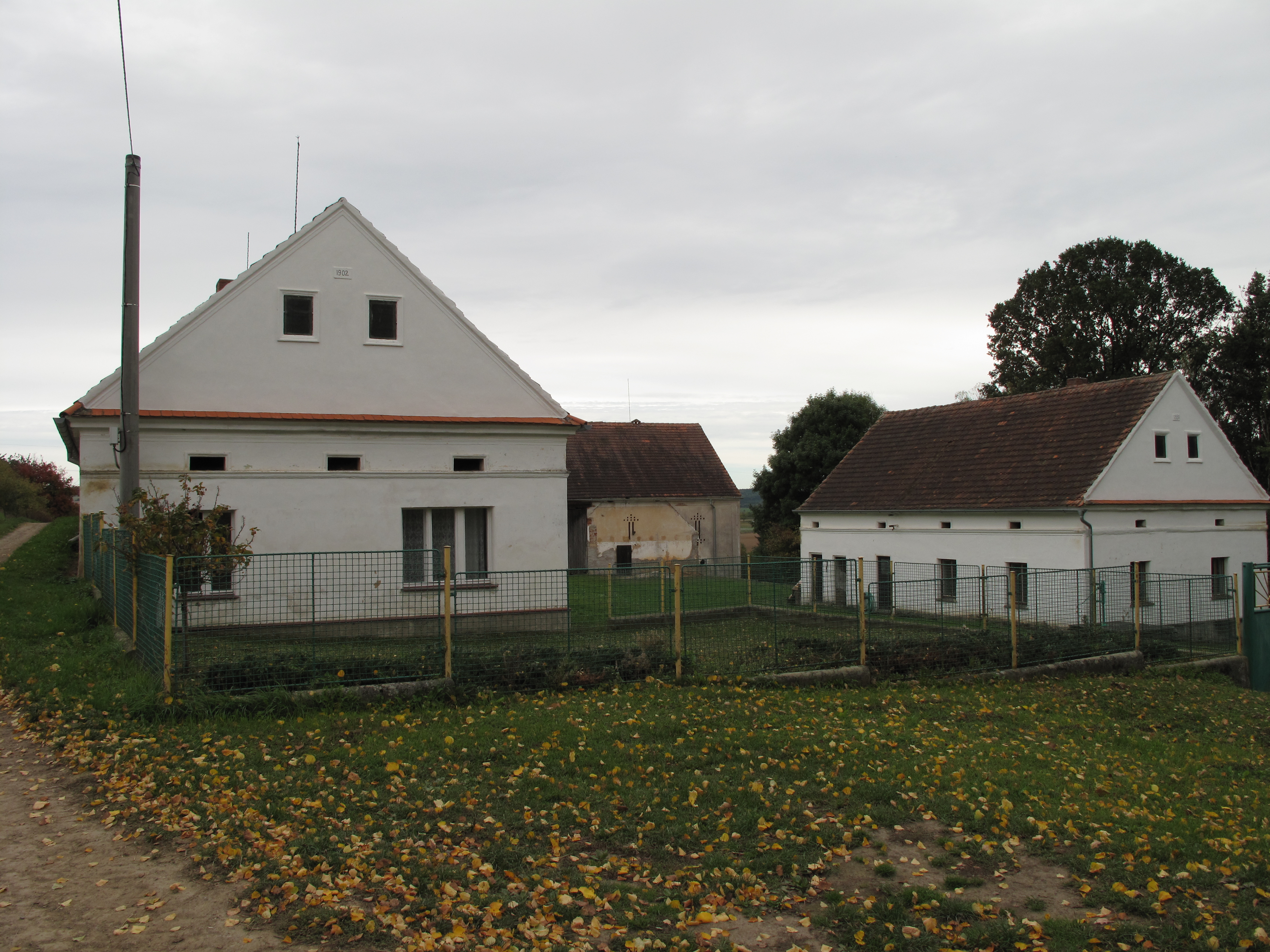 Mstice. Okres Klatovy, Česká republika.